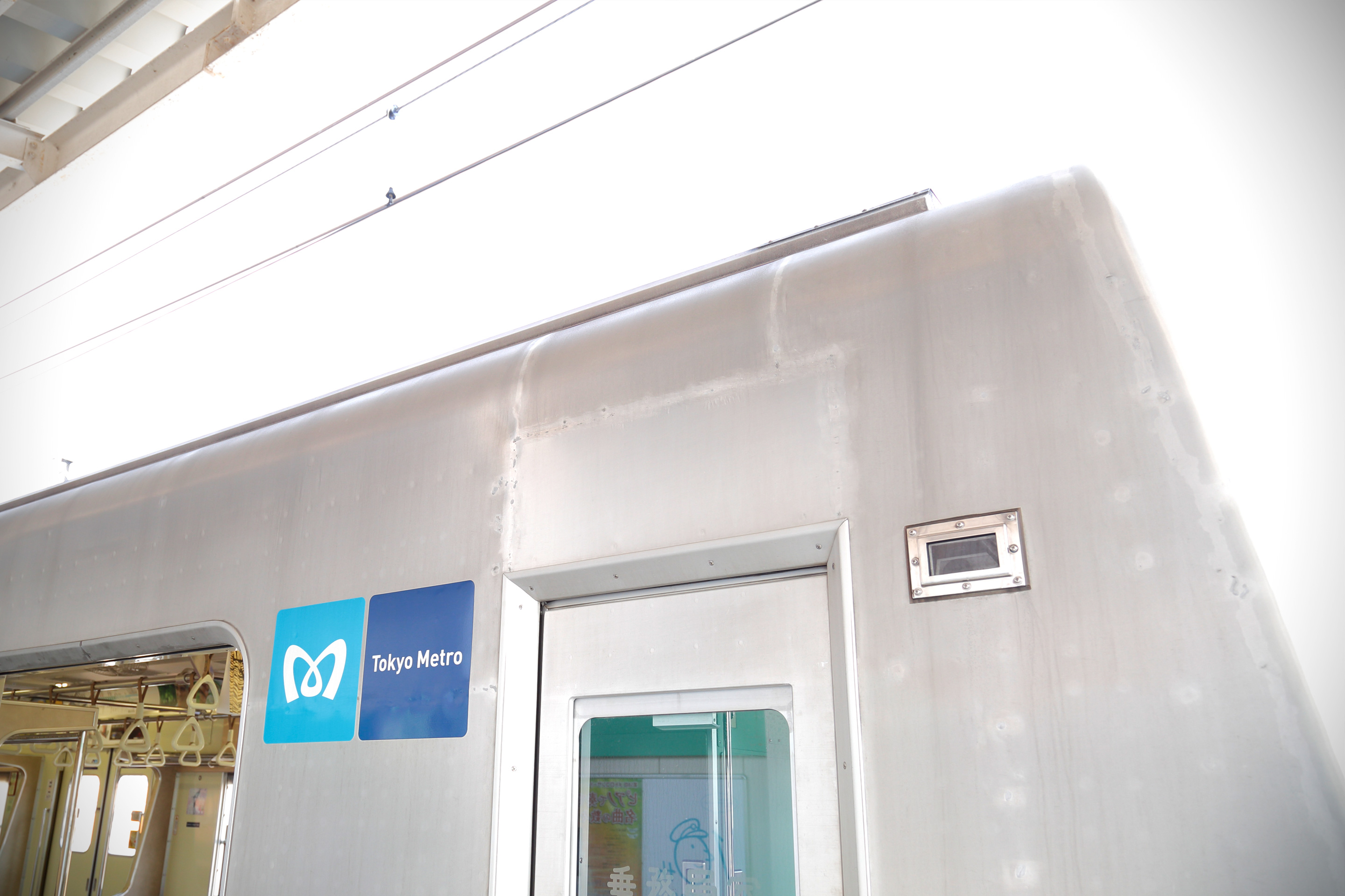 営団6000系（ハイフン車）の乗務員扉切詰め跡。